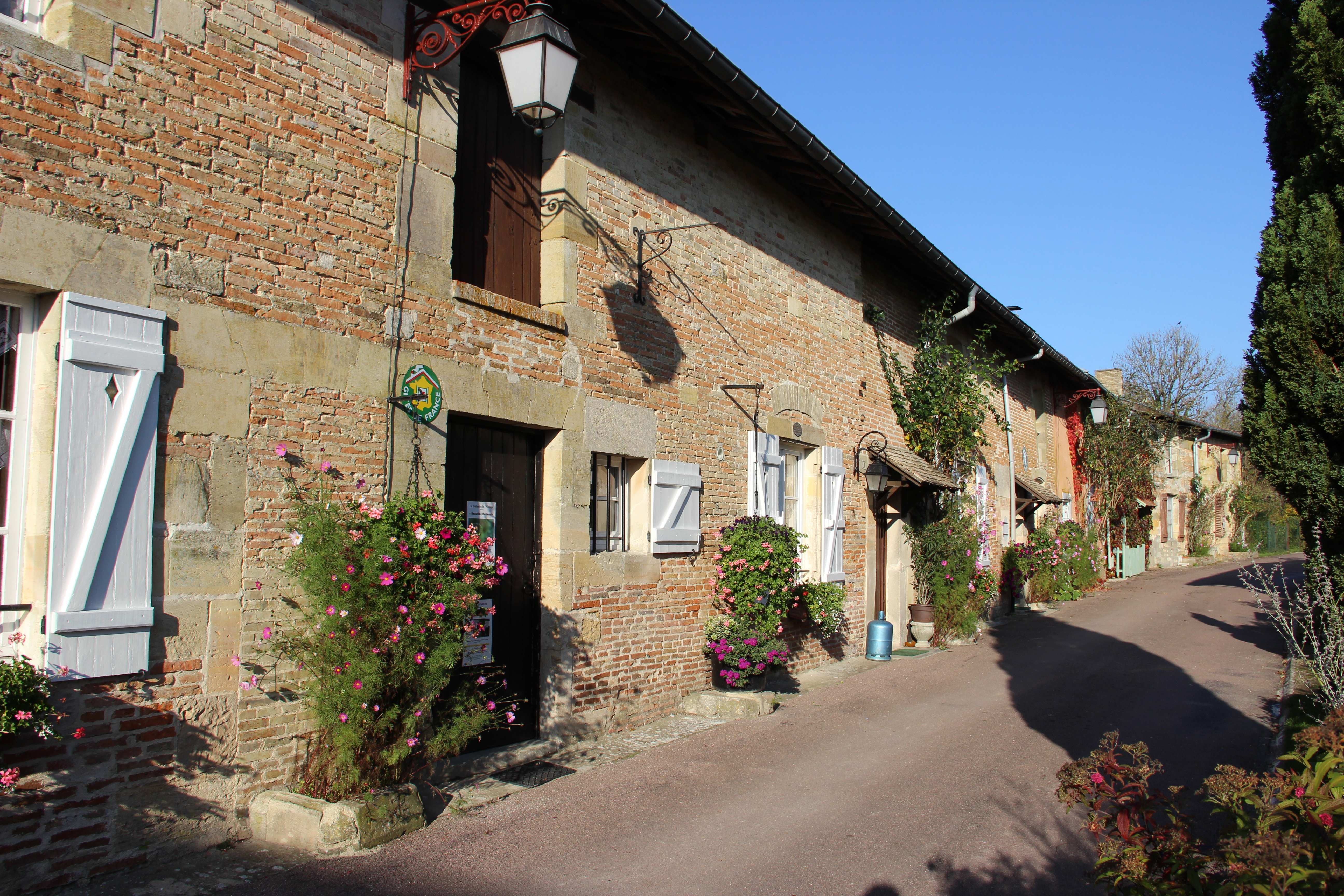 Une rue du village